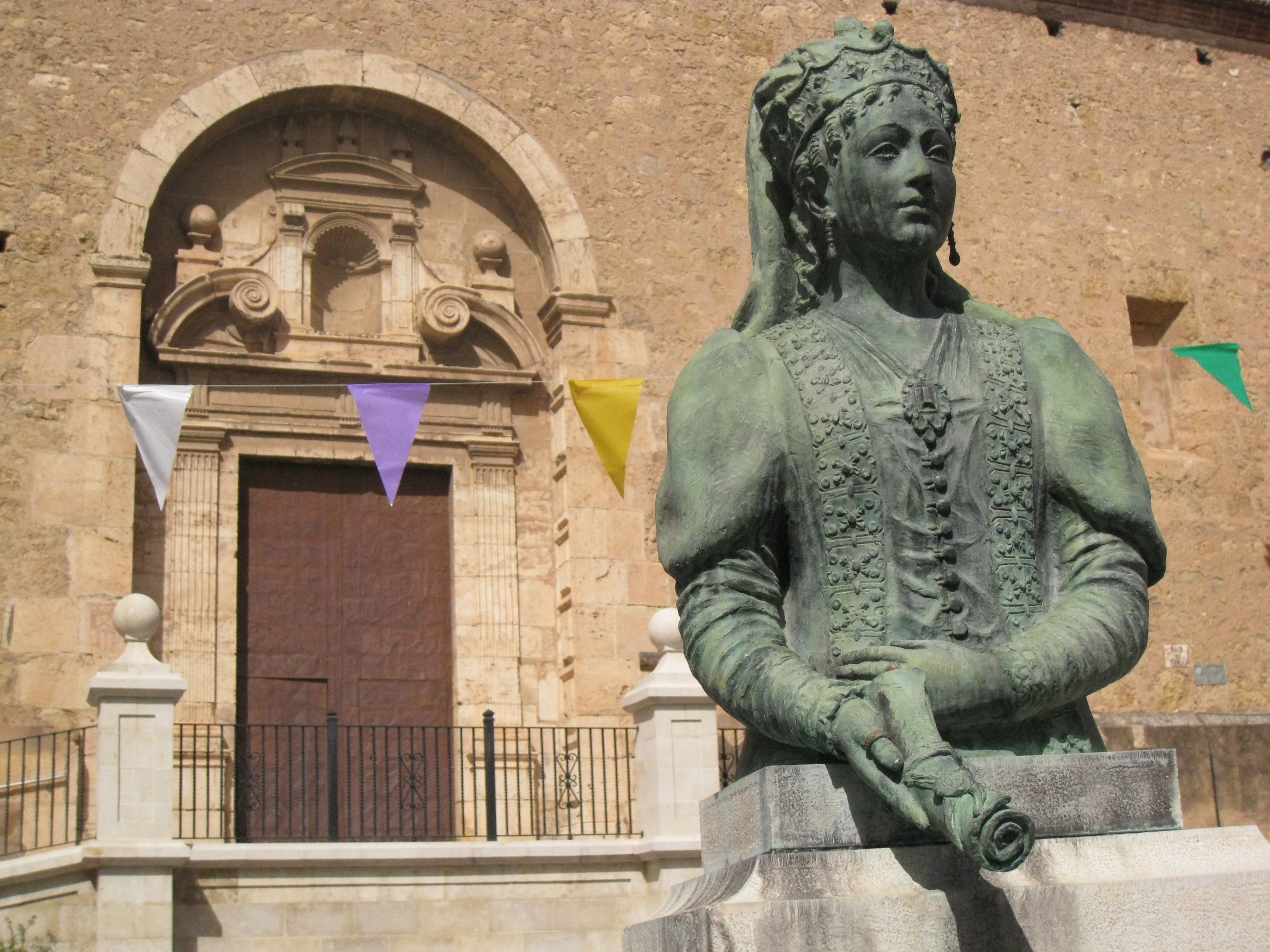 Església de Sant Martí (Sogorb) 07.104-010.